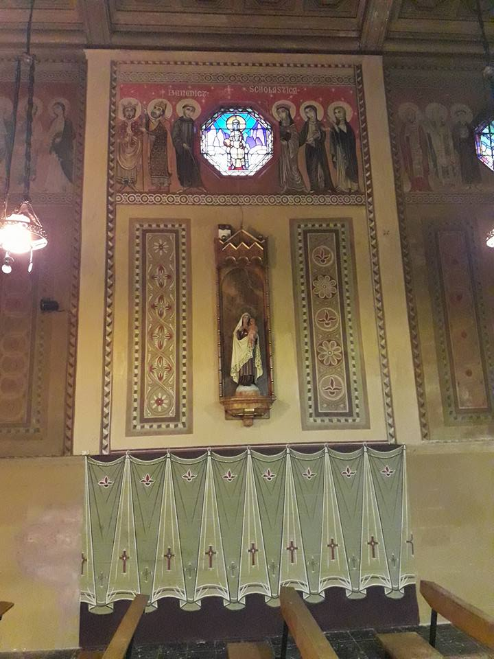 Detall de l'interior de l'església antiga de la Parròquia del Crist Redemptor, Guinardó.